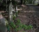 七ヶ所まいり道中の遍路古道。